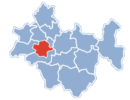 Położenie miasta Radomska na terenie powiatu radomszczańskiego.